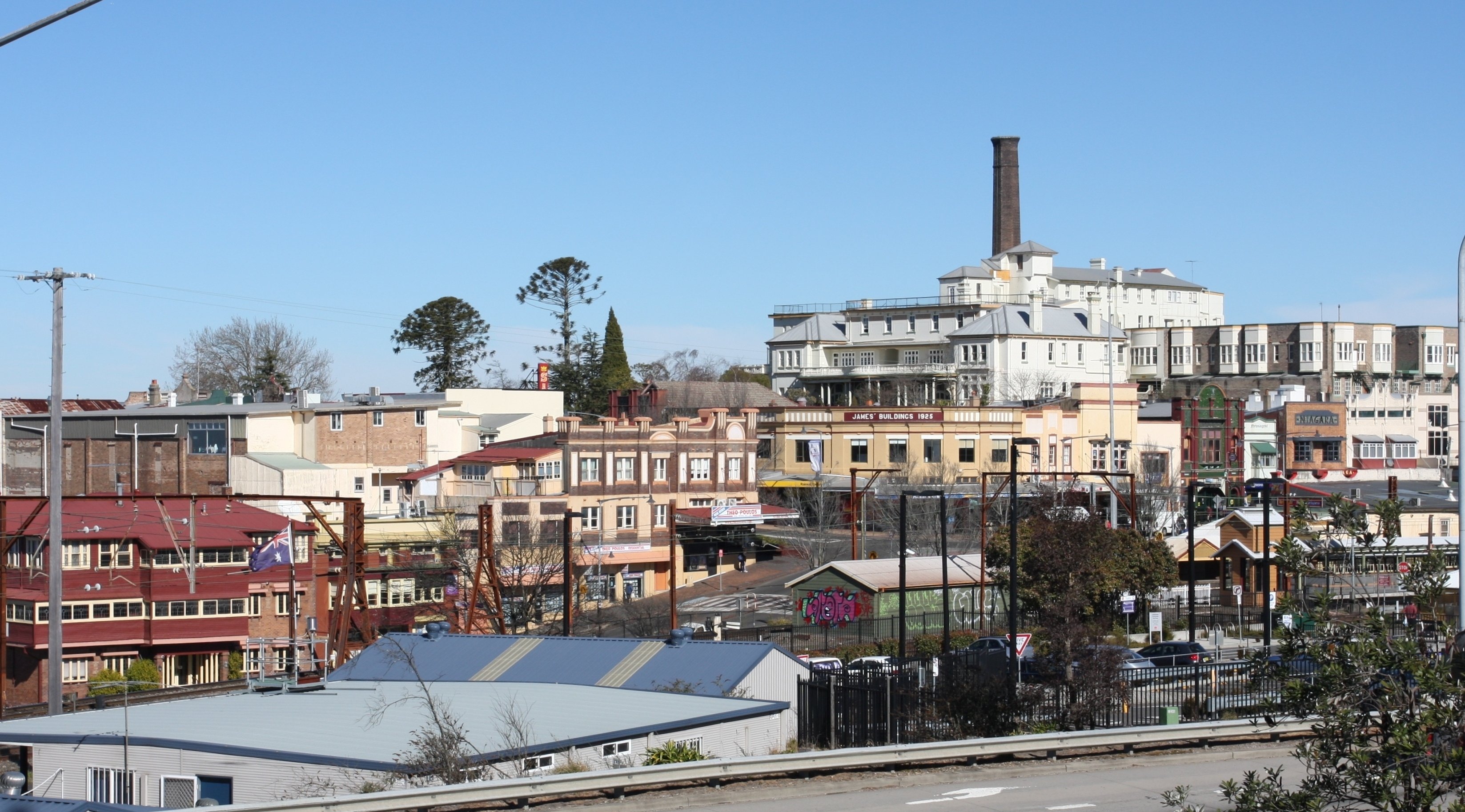 Katooomba